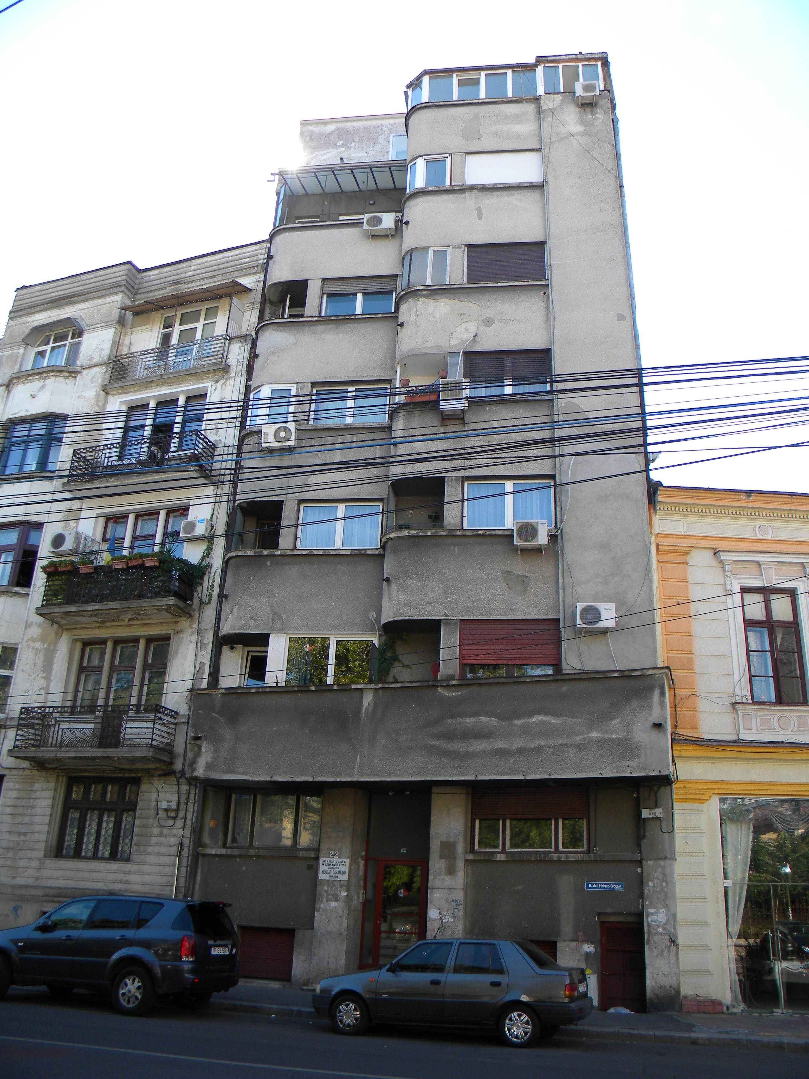 Bucuresti, Romania, Strada Hristo Botev nr. 22 (imobil), sect. 3